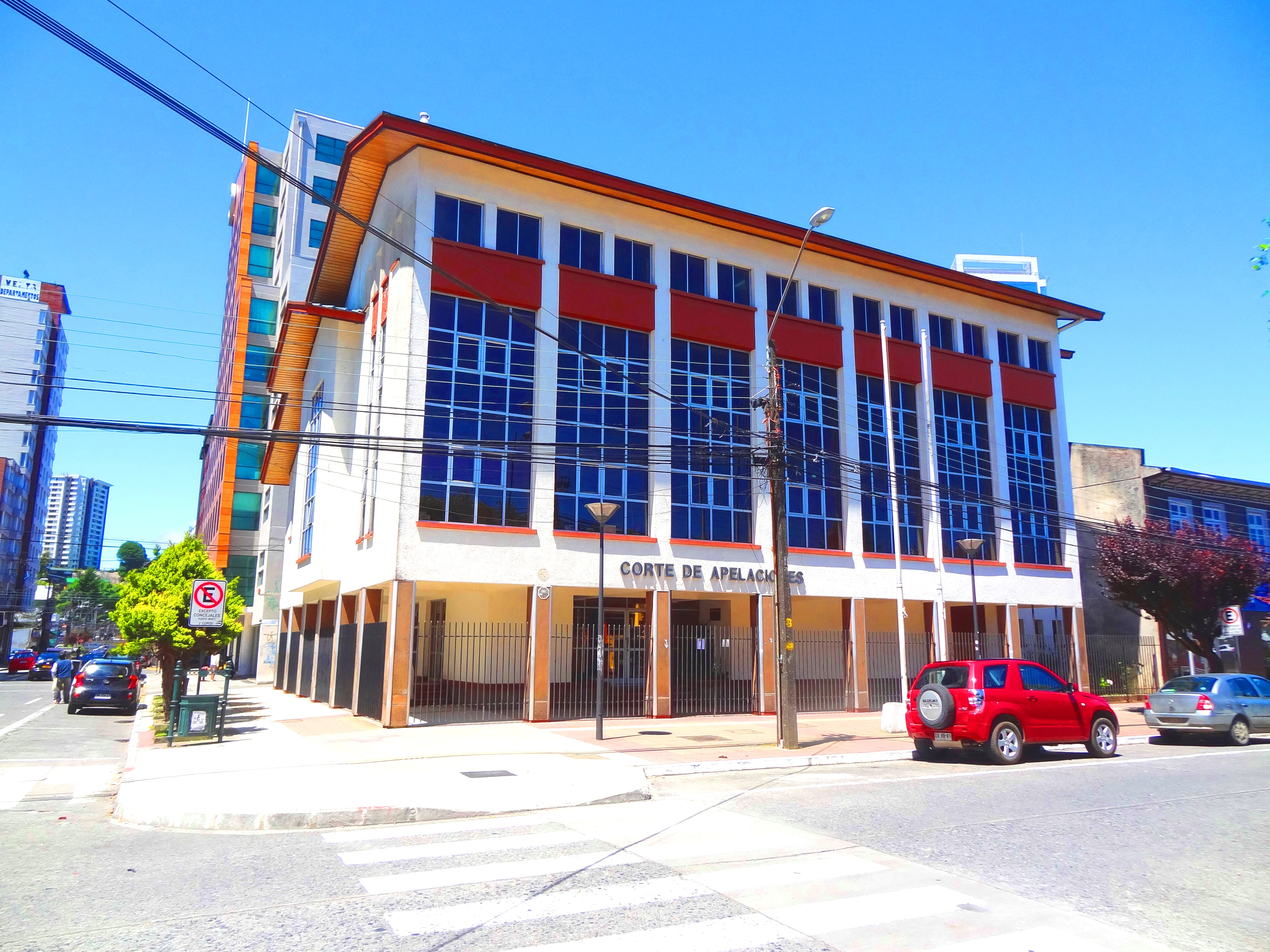 El Edificio de la Justicia en Puerto Montt